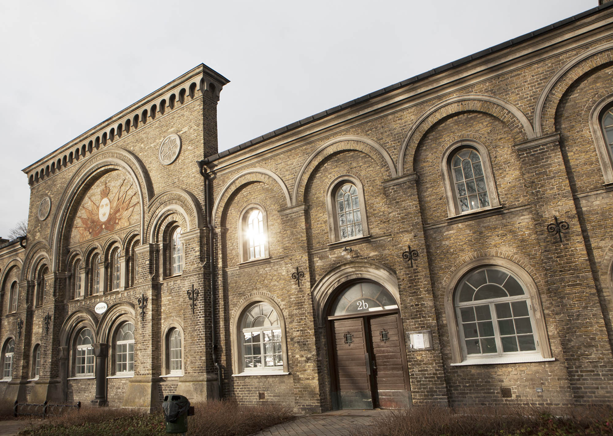 Ett fotografiskt centrum etableras nu i det så kallade Tyghuset i Landskrona centrum med lokaler för arkiv, fotohistoriska utställningar, utställningar av samtida fotografi, utbildning, forskarrum och bibliotek.